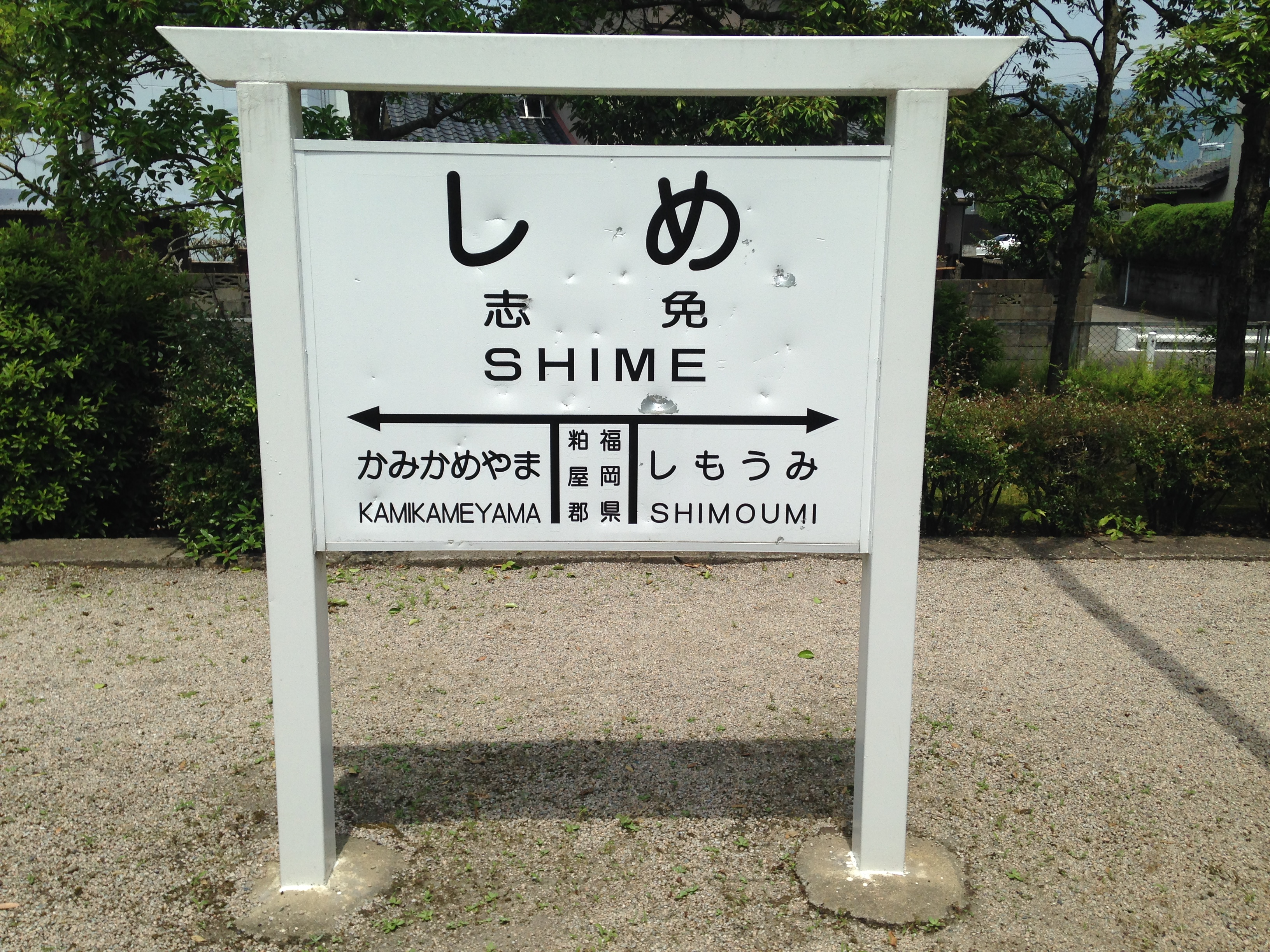 志免鉄道記念公園・復元された旧志免駅の駅名標